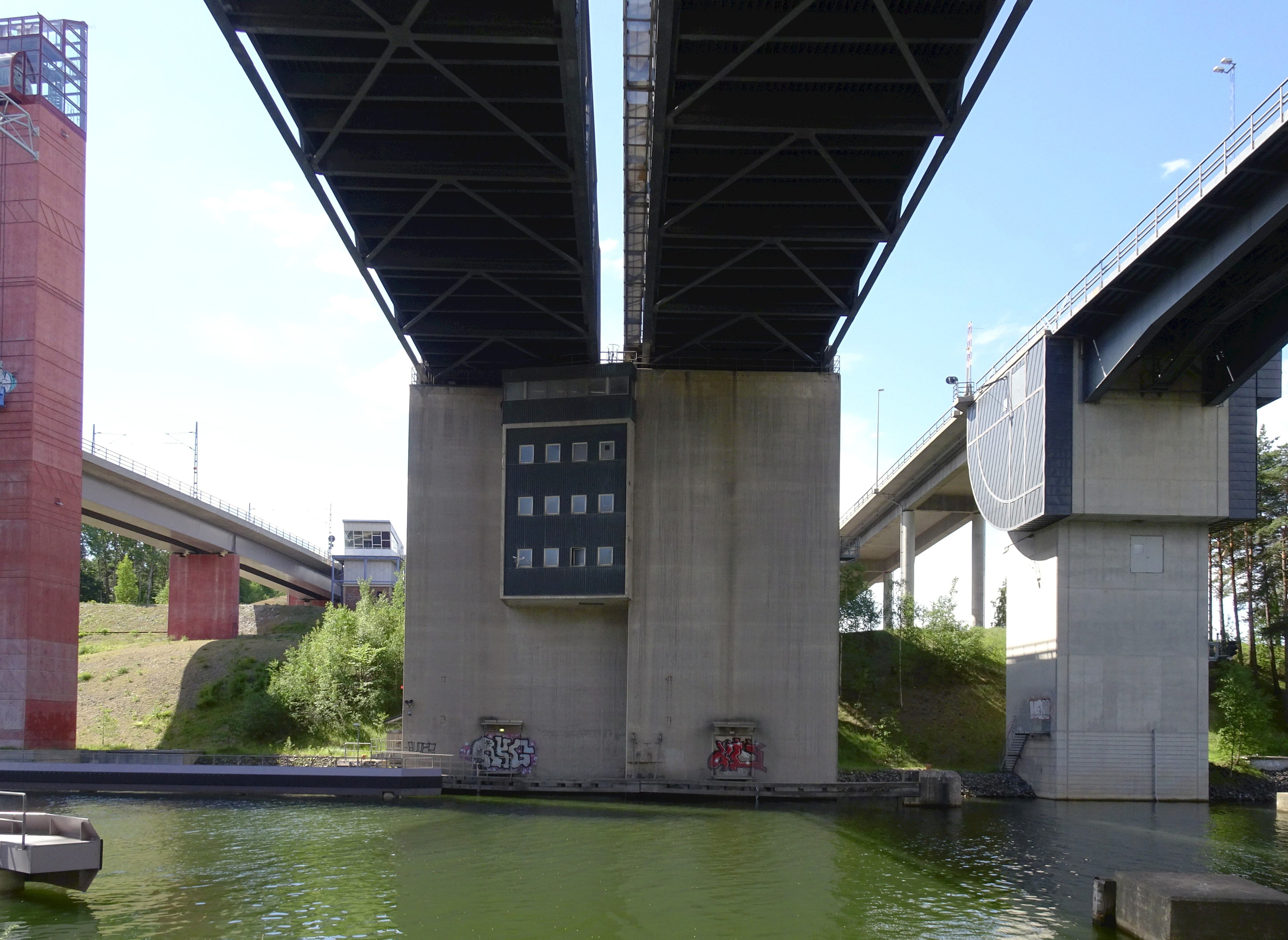 Saltsjöbron (t.h.), E4-bron (mitten) och Järnvägsbron